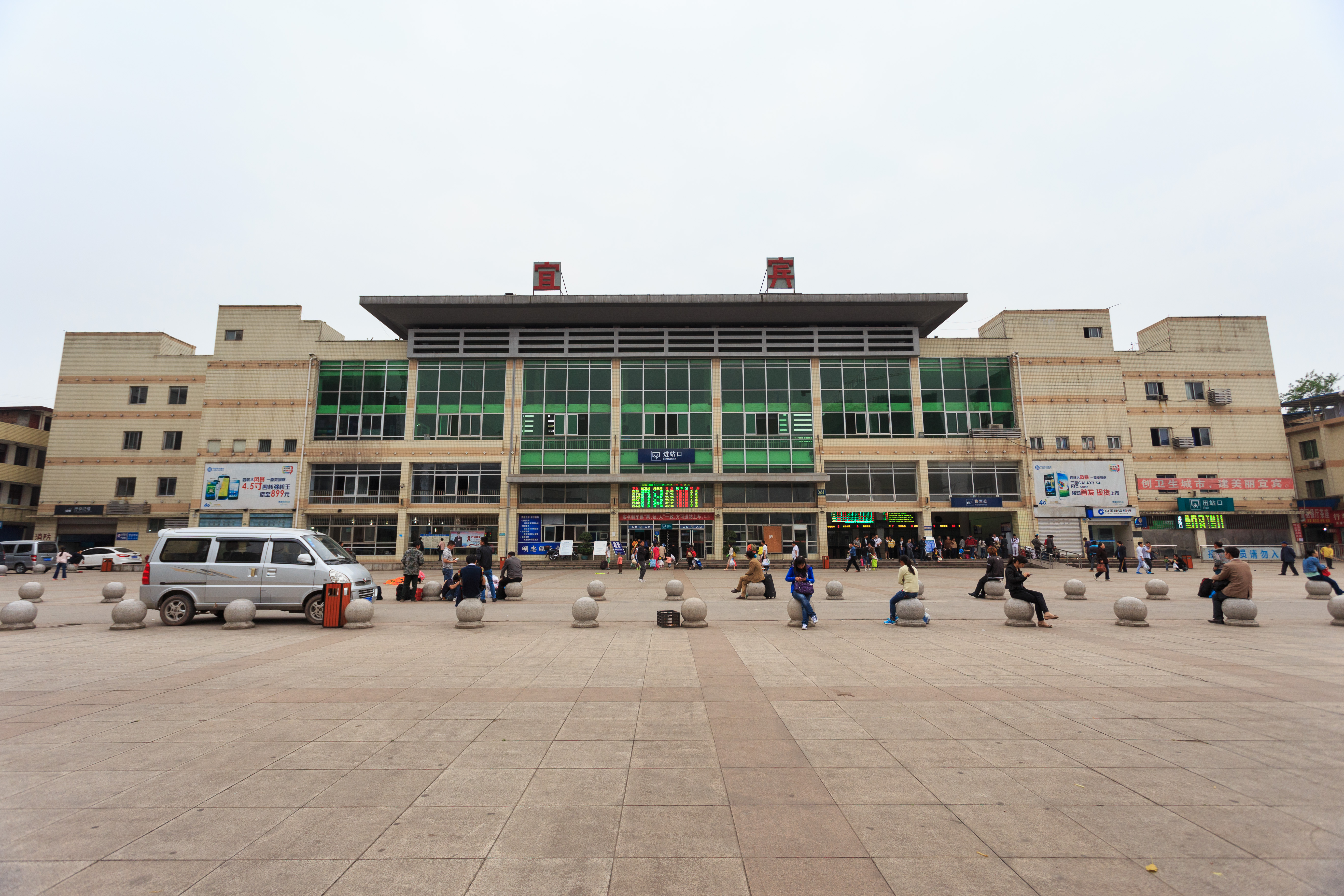 宜宾火车站